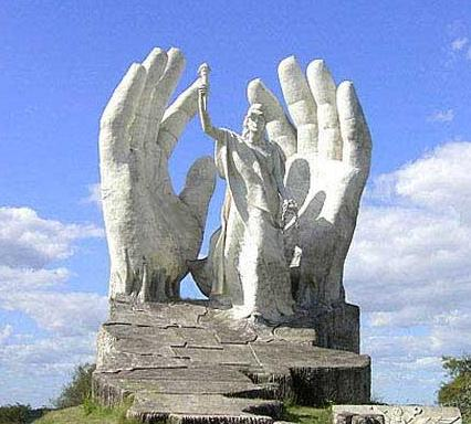 Monumento a la República en el parque La Salamanca de Concepción del Uruguay. La imagen fue redimensionada de la original tomada de bajo la licencia especificada.